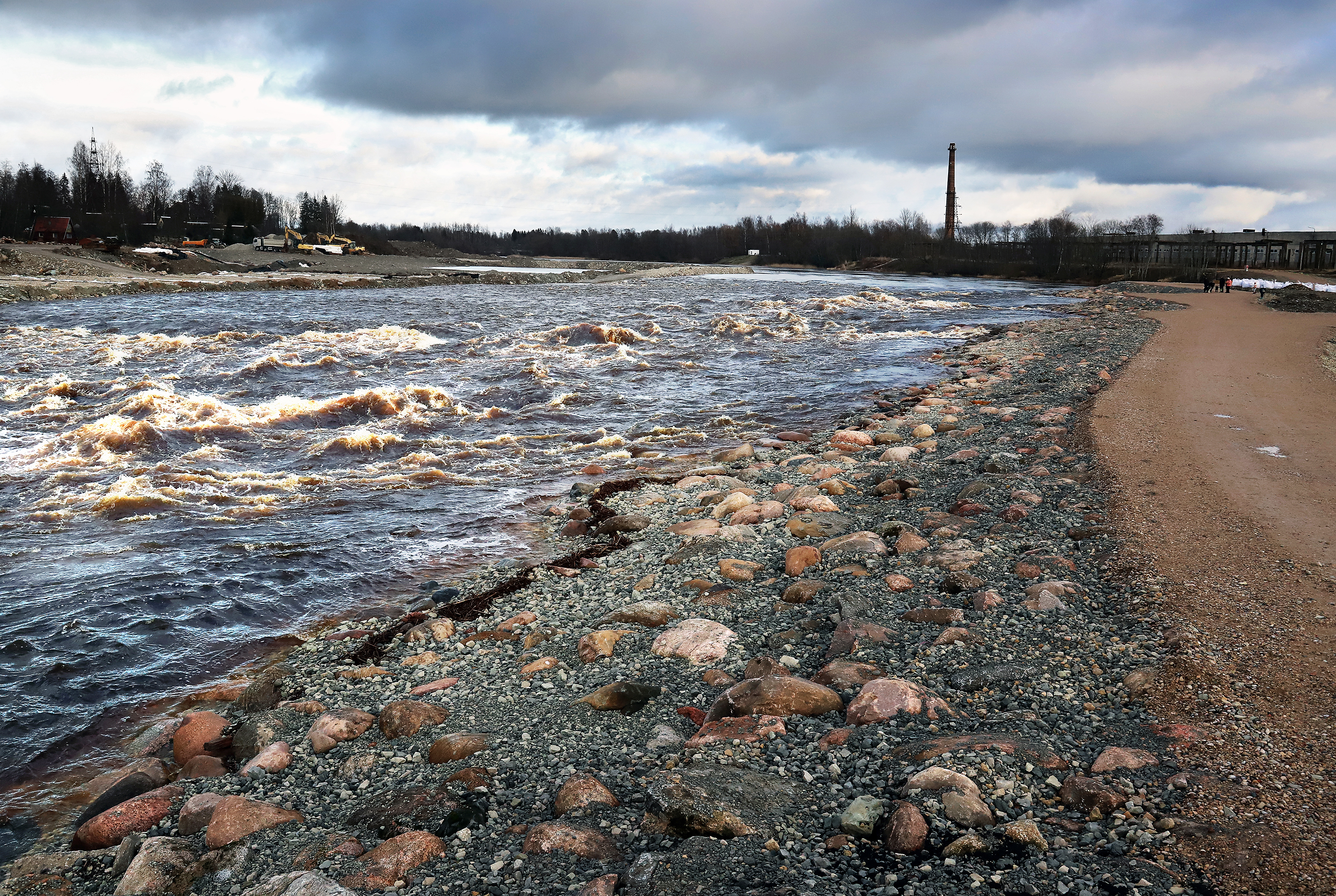 Sindi kalakärestik talvel 19. jaanuar 2020